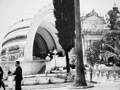 Plaza de Armas en la década de 1930